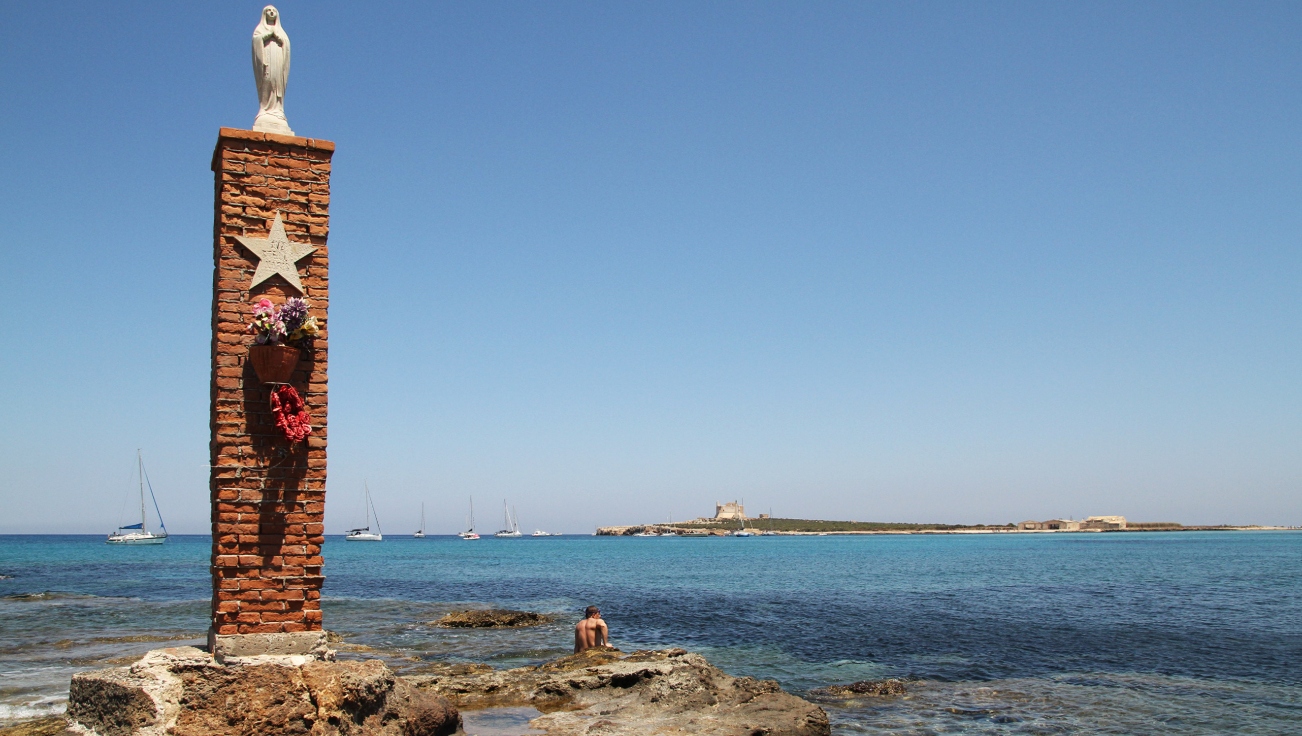 Isola di Capo Passero, Portopalo di Capo Passero SR, Sicily, Italy